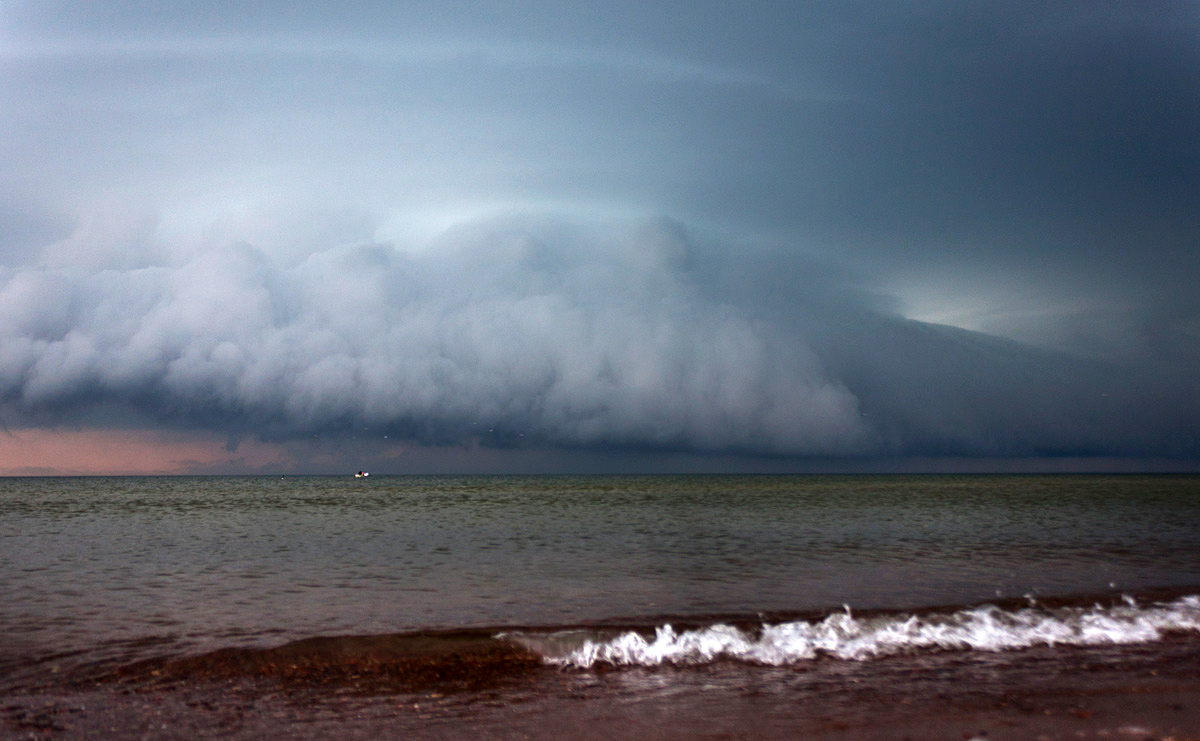 Negaiss Pape 07.2013